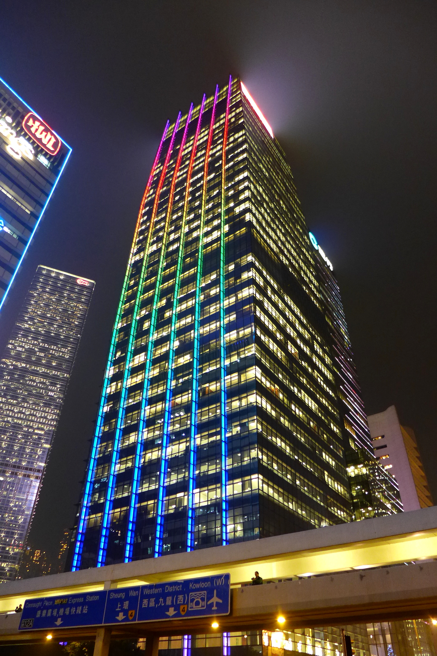 AIA Central night view